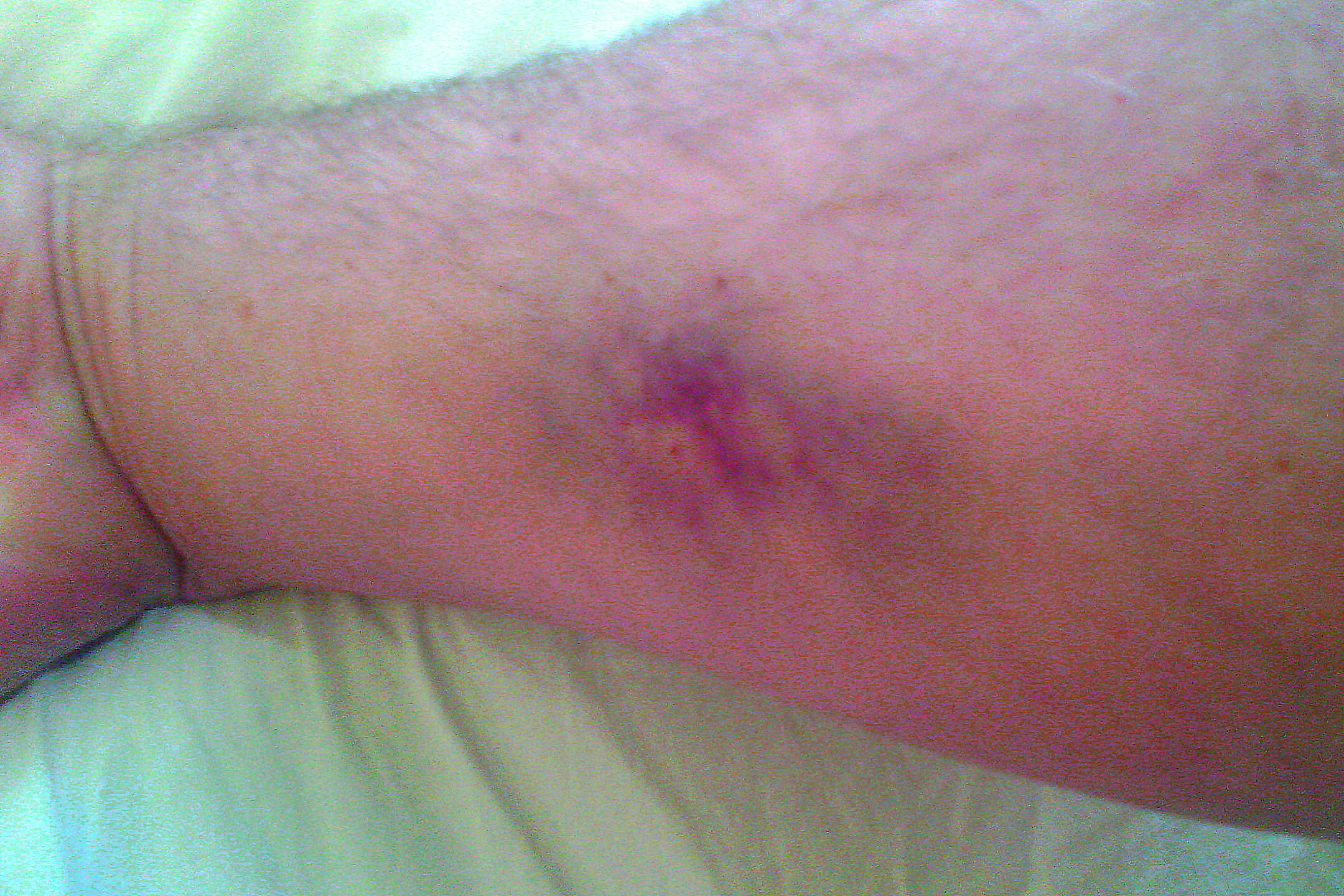 Гематома (синяк) в результате непопадания иглы в вену при установке каппельницы. Впрочем, вероятнее всего, причиной этого могло стать то, что пациент сам неловко повернул руку во время процедуры (например во сне).